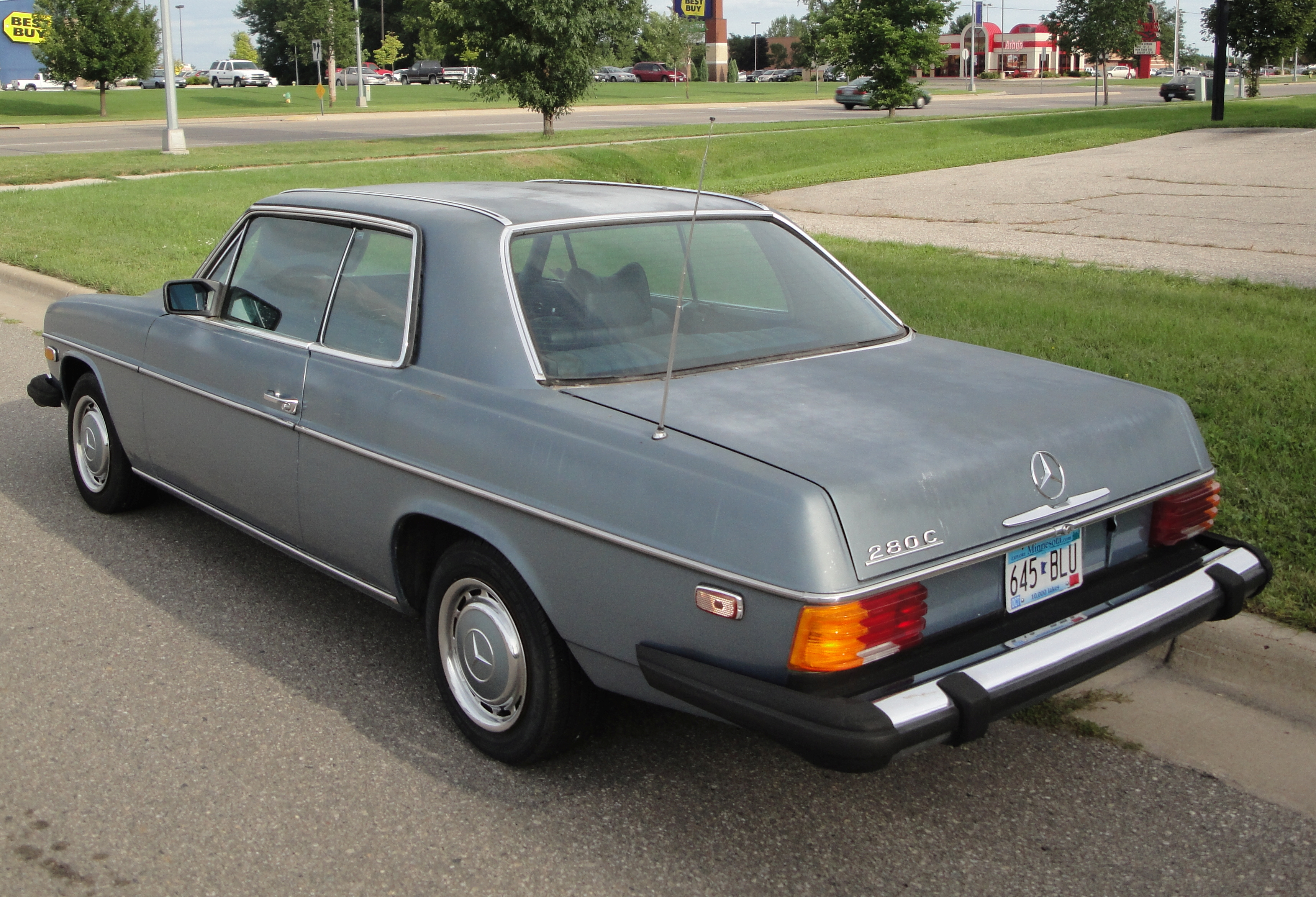 76 Mercedes 280C